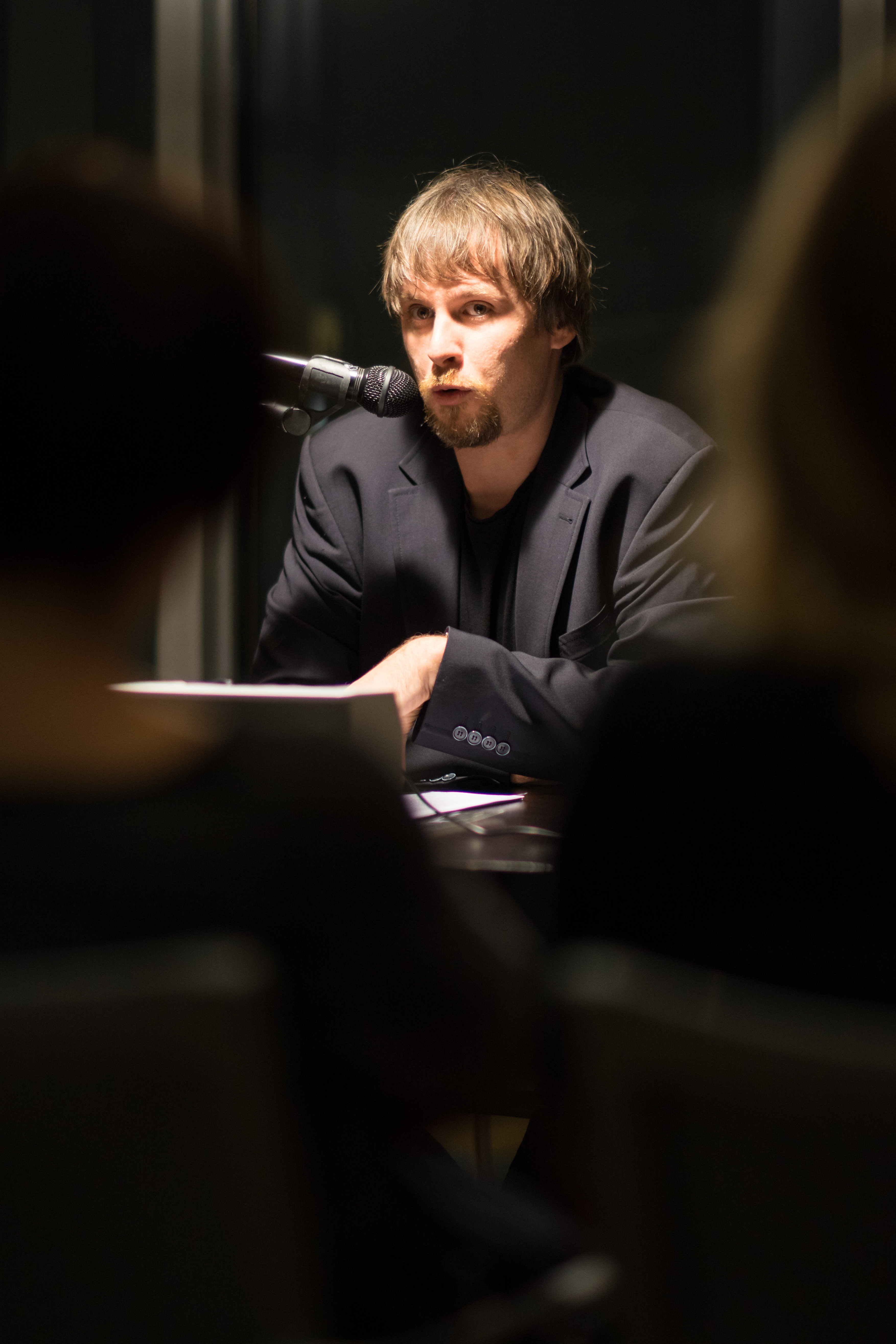 Das Bild zeigt Lukas Pellmann bei einer Lesung.